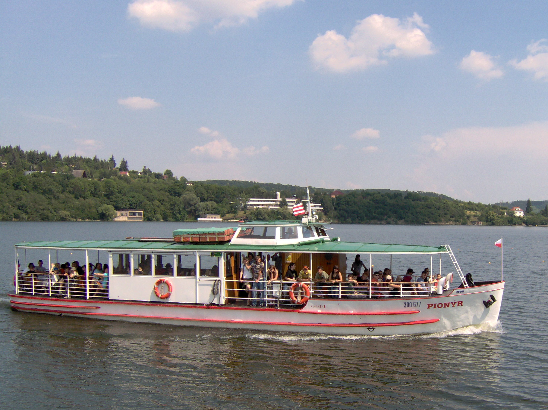 Turistický parník "Pionýr" na brněnské přehradě